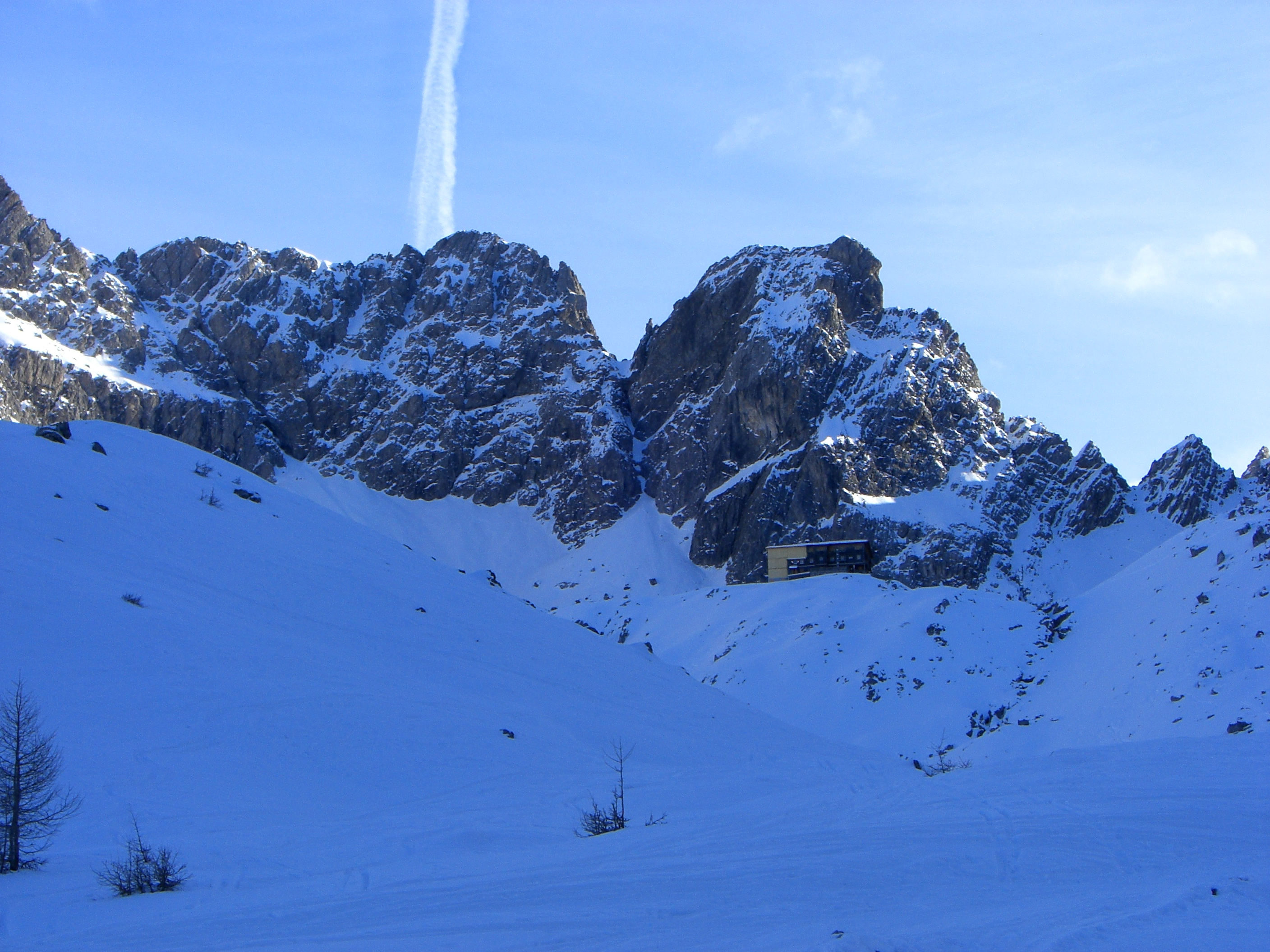 Karlsbader Hütte im Dezember 2006, hier ist auch ein Teil der Abfahrtstrecke der Laserzlaufes sichtbar.